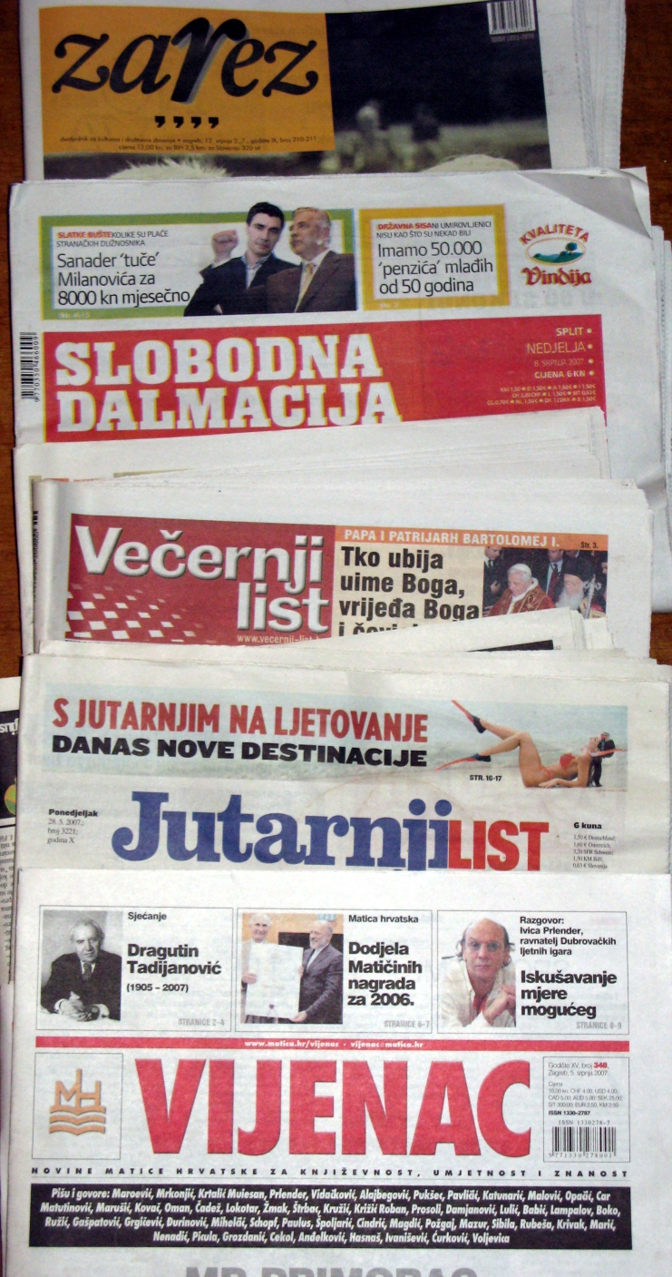 Hrvatske tiskovine